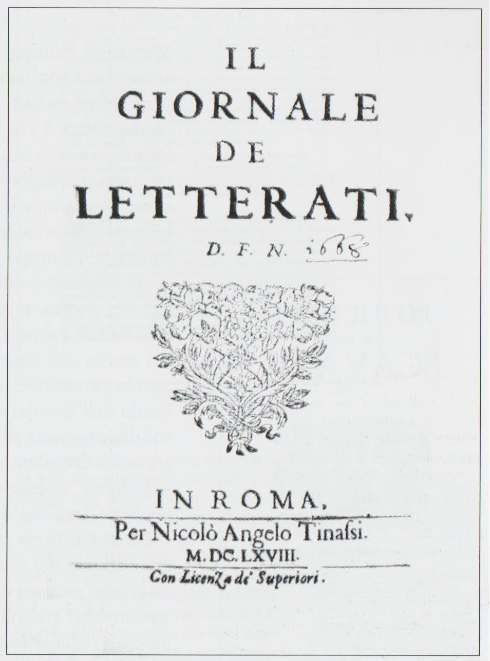 Frontespizio del «Giornale de' letterati», fondato a Roma dall'abate Francesco Nazzari nel 1668. È considerato la prima rivista letteraria italiana.